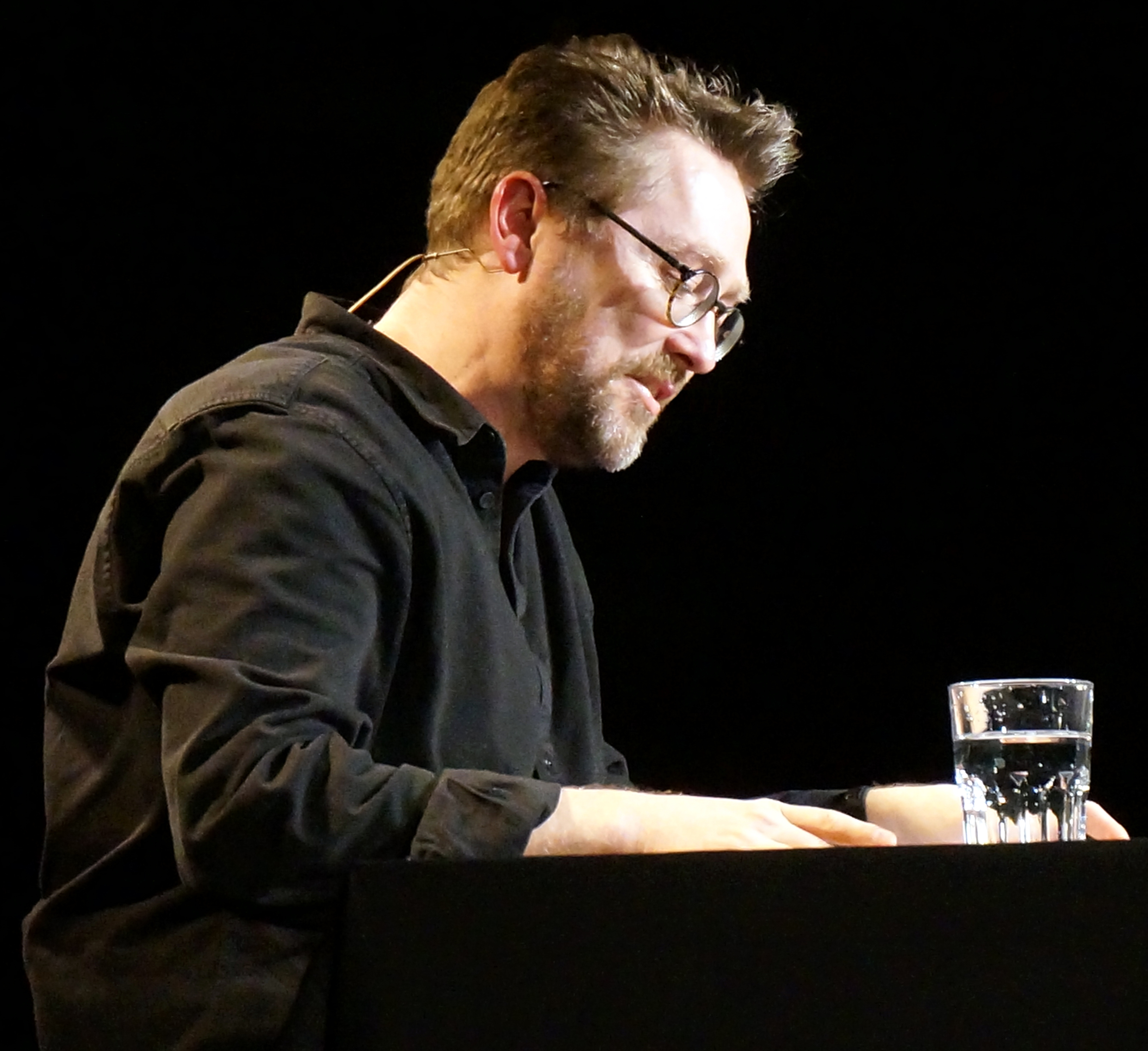 Der Kolumnist, Journalist und Buchautor Jan Weiler bei einer Lesung im Rahmen seines Programmes Berichte aus dem Christstollen im Dezember 2013 in Gröbenzell